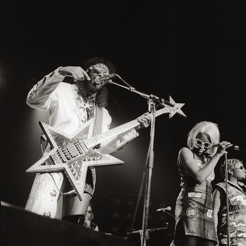 Bootsy Collins im E-Werk in Köln